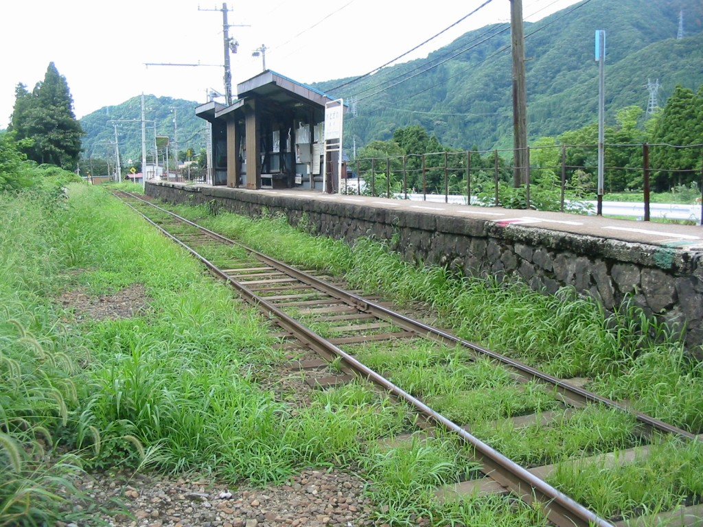 富山地方鉄道音沢駅